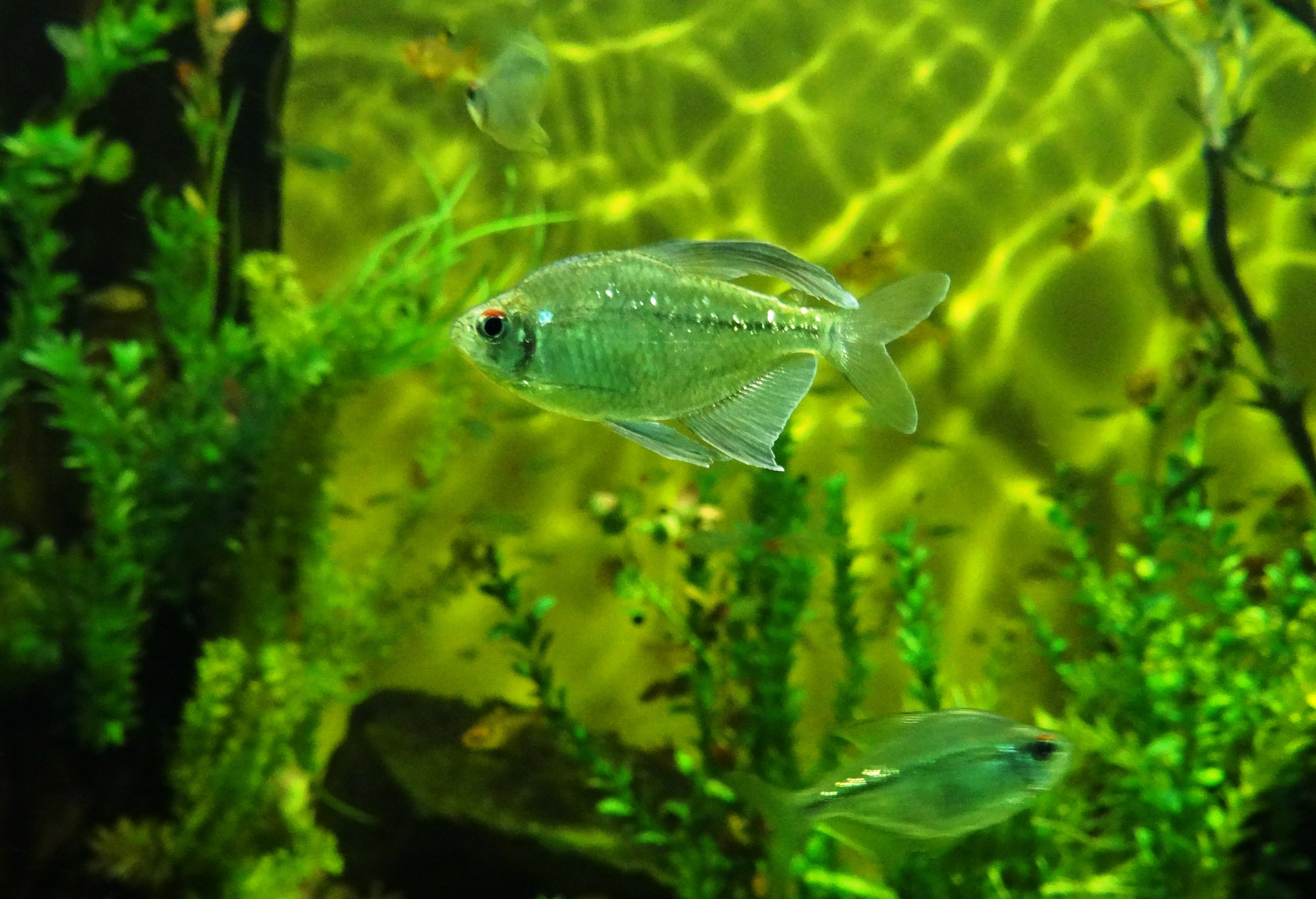 Tetra diamante (Moenkhausia pittieri) en el acuario del Zoológico de Cali, Colombia